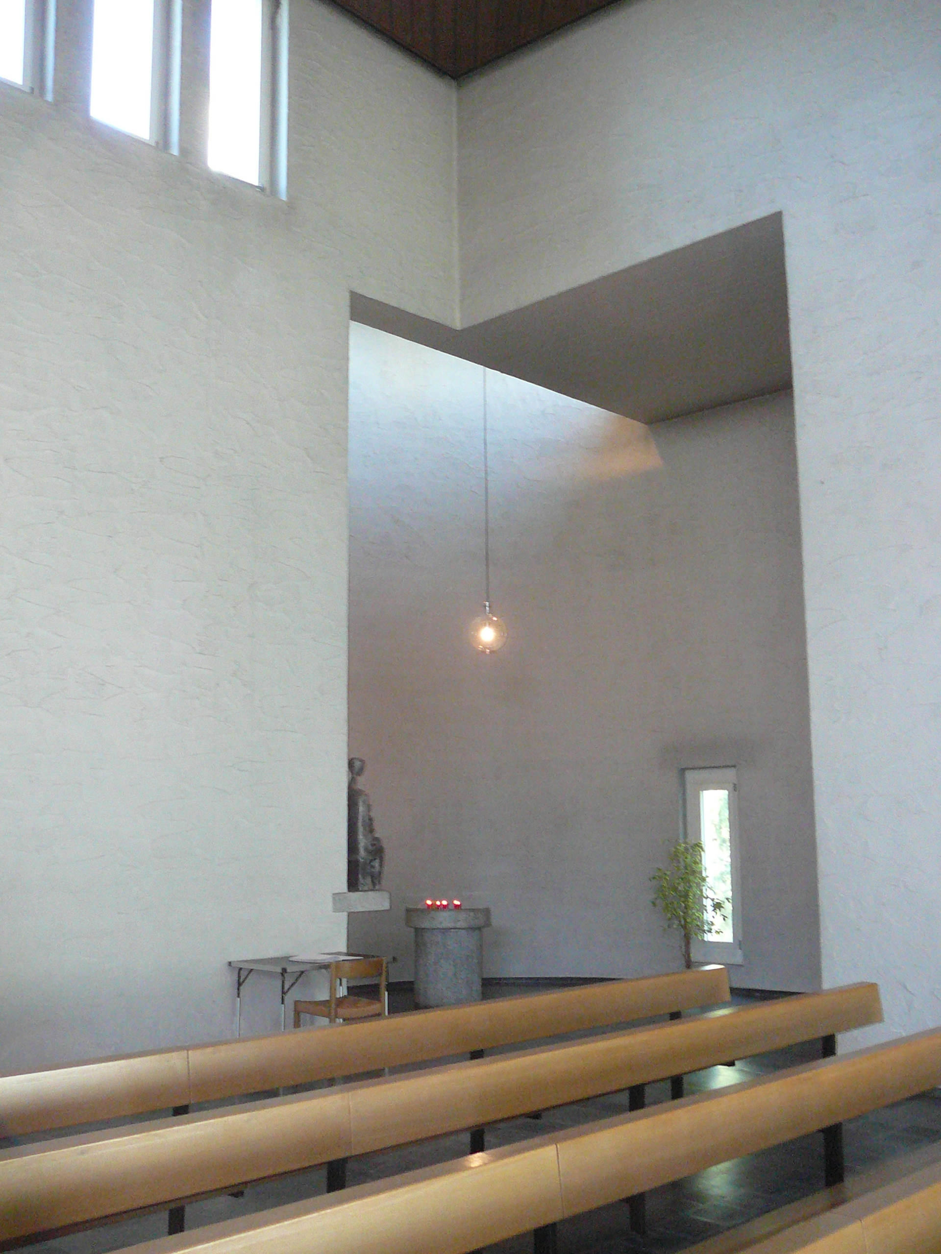 Römisch-katholische Pfarrkirche St. Petrus Rümlang, Eingangsbereich